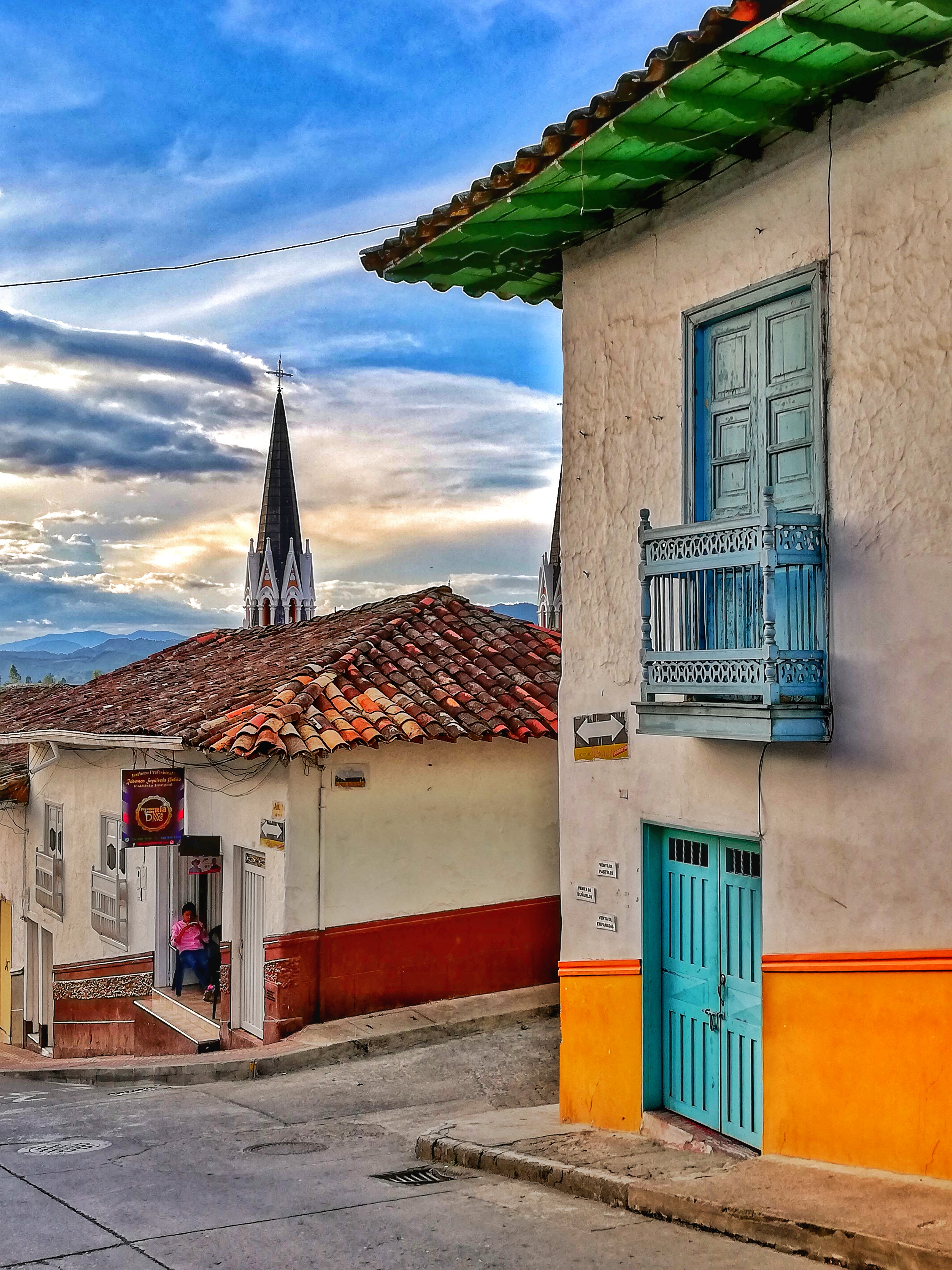 Calle Medellin